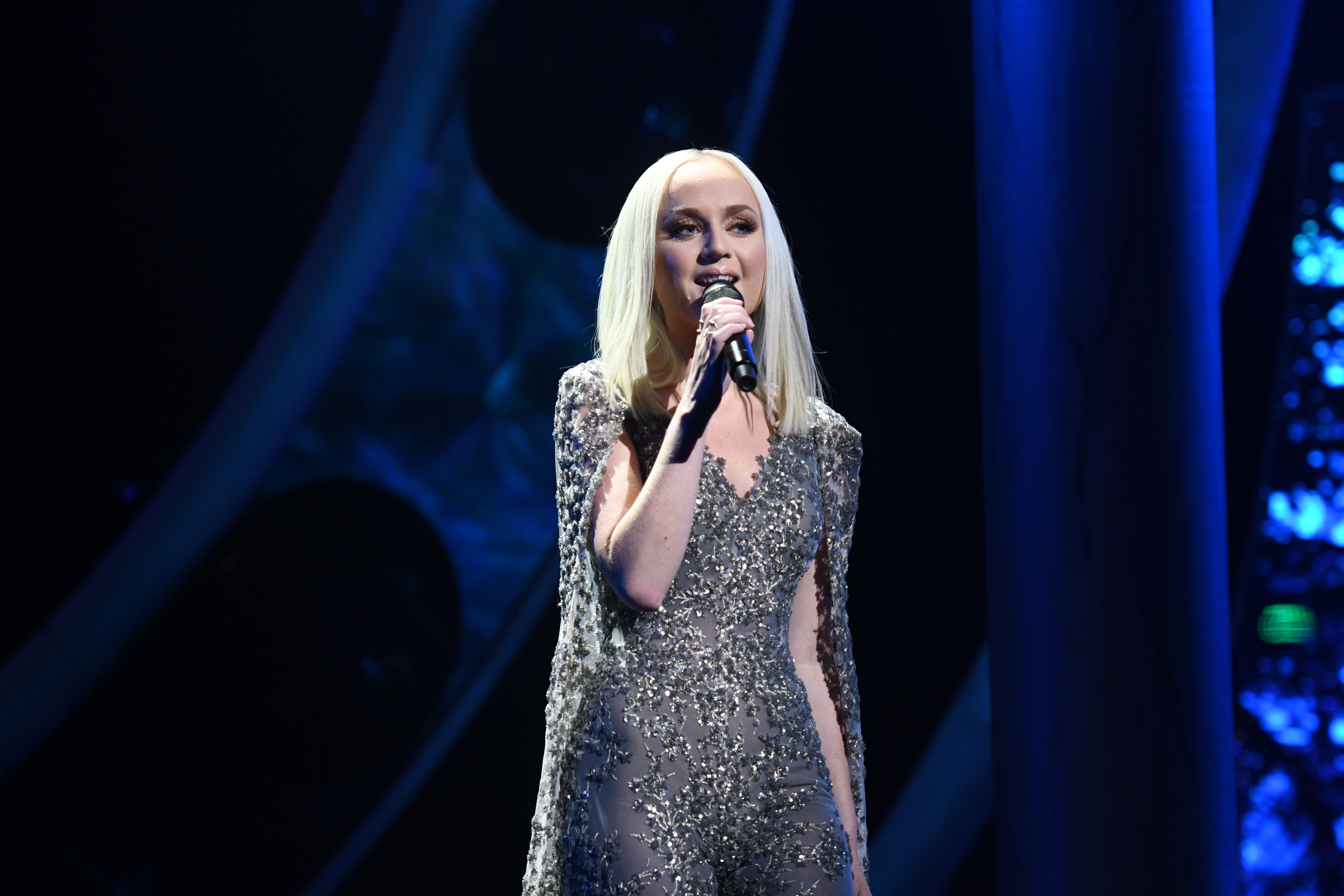 Melodifestivalen 2019, deltävling 1, Scandinavium, Göteborg, Anna Bergendahl